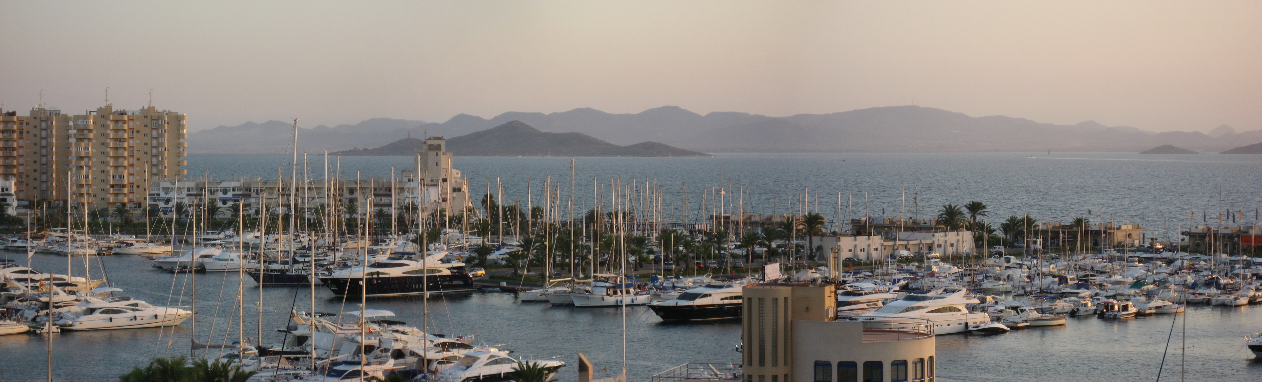 Vista del Puerto Tomás Maestre - La Manga Del Mar Menor